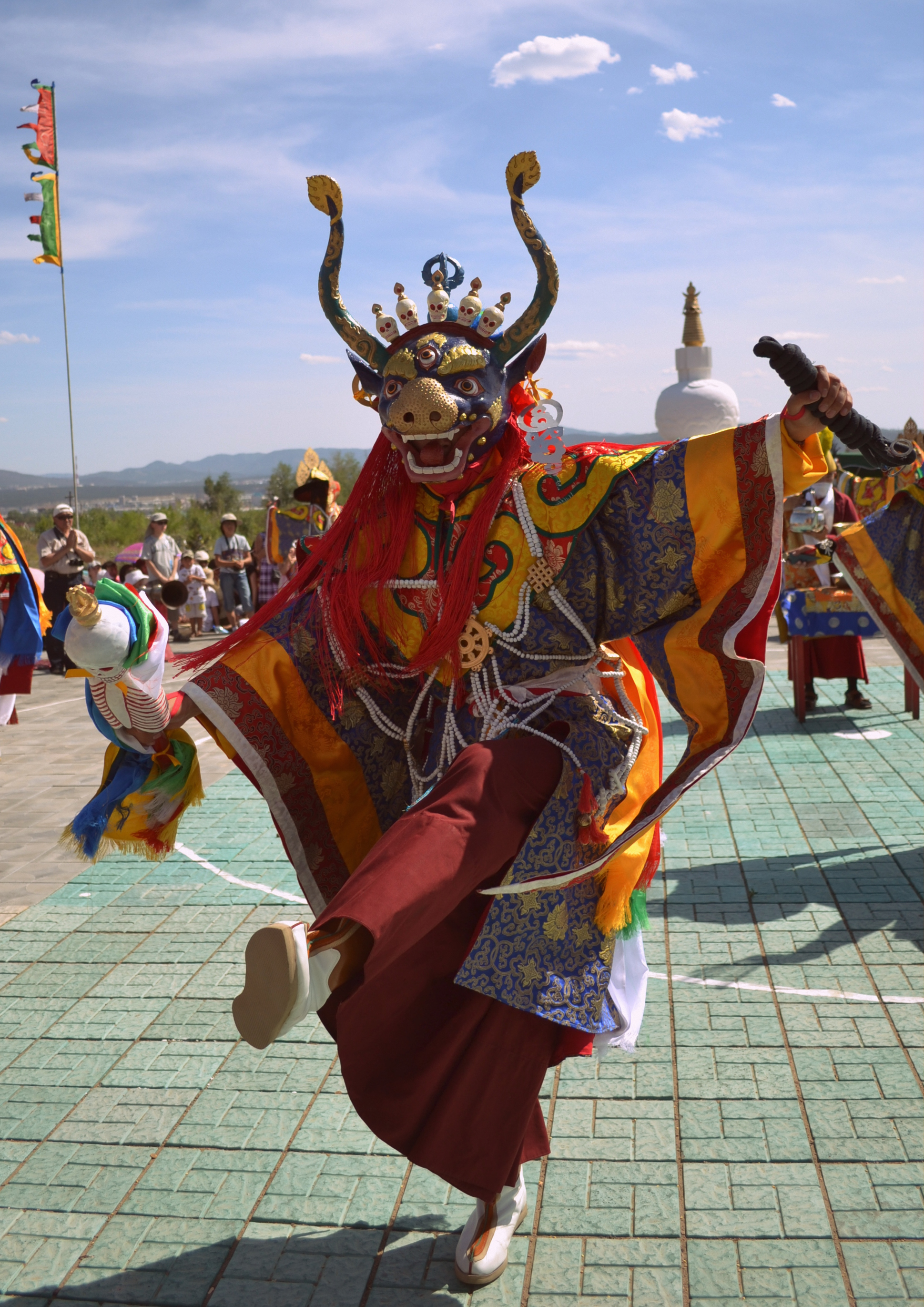 Мистерия Цам в дацане Хамбын Хурэ. Бурятия, Улан-Удэ